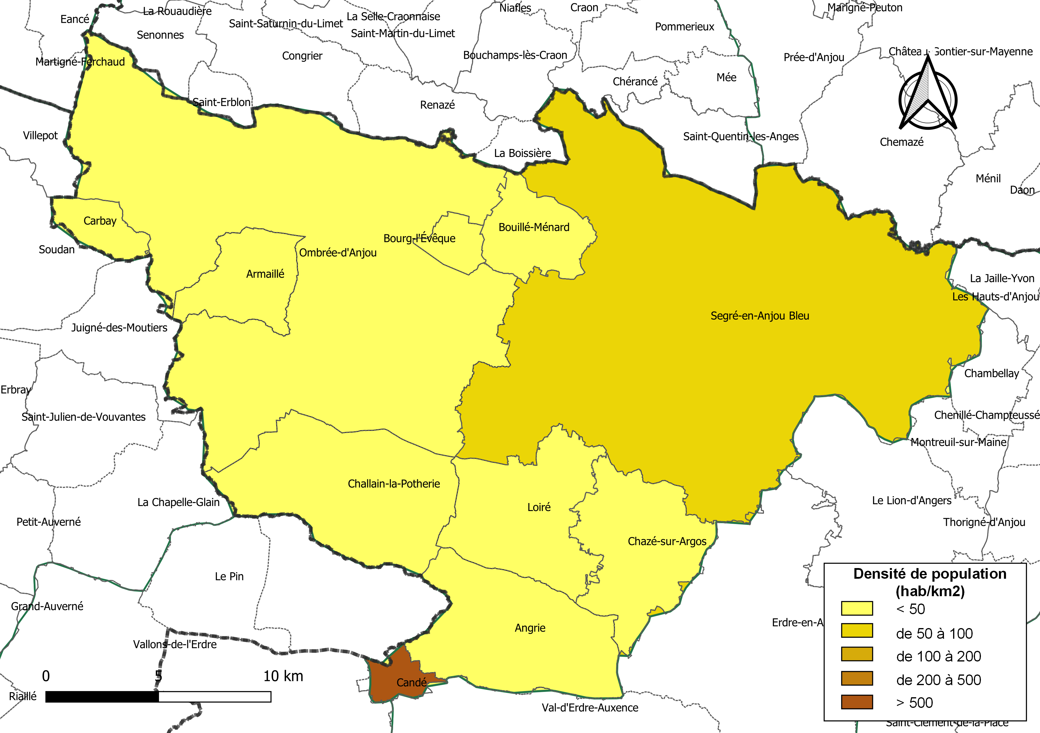 Carte des densités de population (millésimée 2016) des communes de l'intercommunalité Anjou Bleu Communauté, département de Maine-et-Loire, France. Composition au 1er janvier 2019.